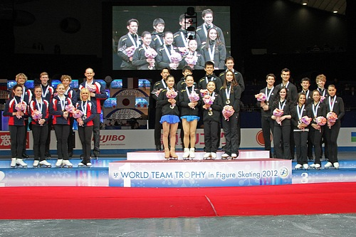 Церемония награждения на командном чемпионате мира по фигурному катанию 2012. Первой место (в центре) - команда Японии, второе (слева) - команда США, третье (справа) - команда Канады.